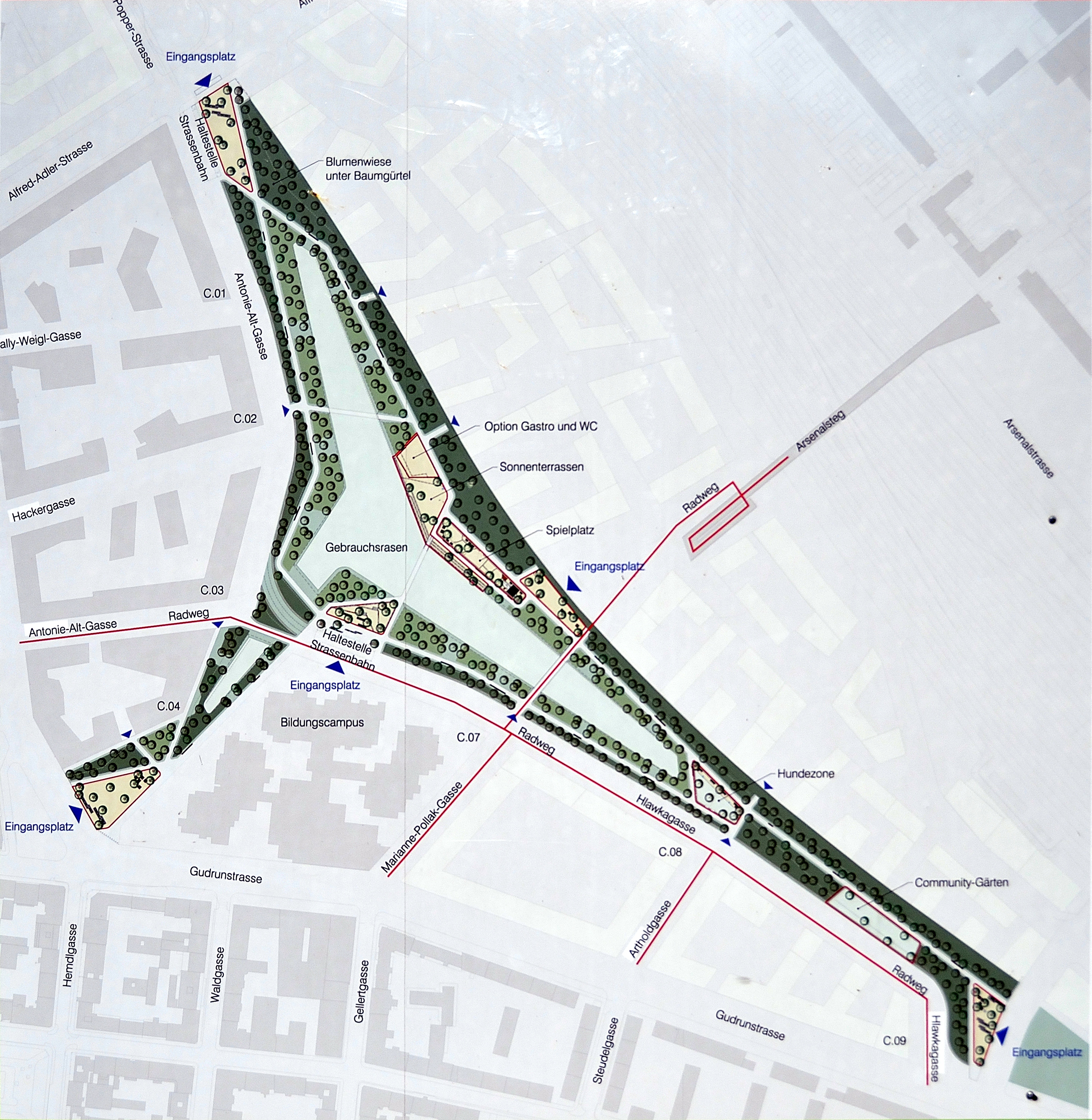 Plan des Helmut-Zilk-Park abfotografiert von einer öffentlichen Informationstafel. Der Helmut-Zilk-Park ist ein 2015-2017 neu geschaffener Park im Sonnwendviertel in Wien Favoriten.